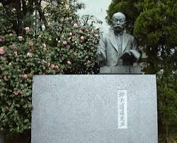 in suo onore la Waseda University Tsubouchi Memorial Theatre Museum ospita una vasta collezione delle sue opere.